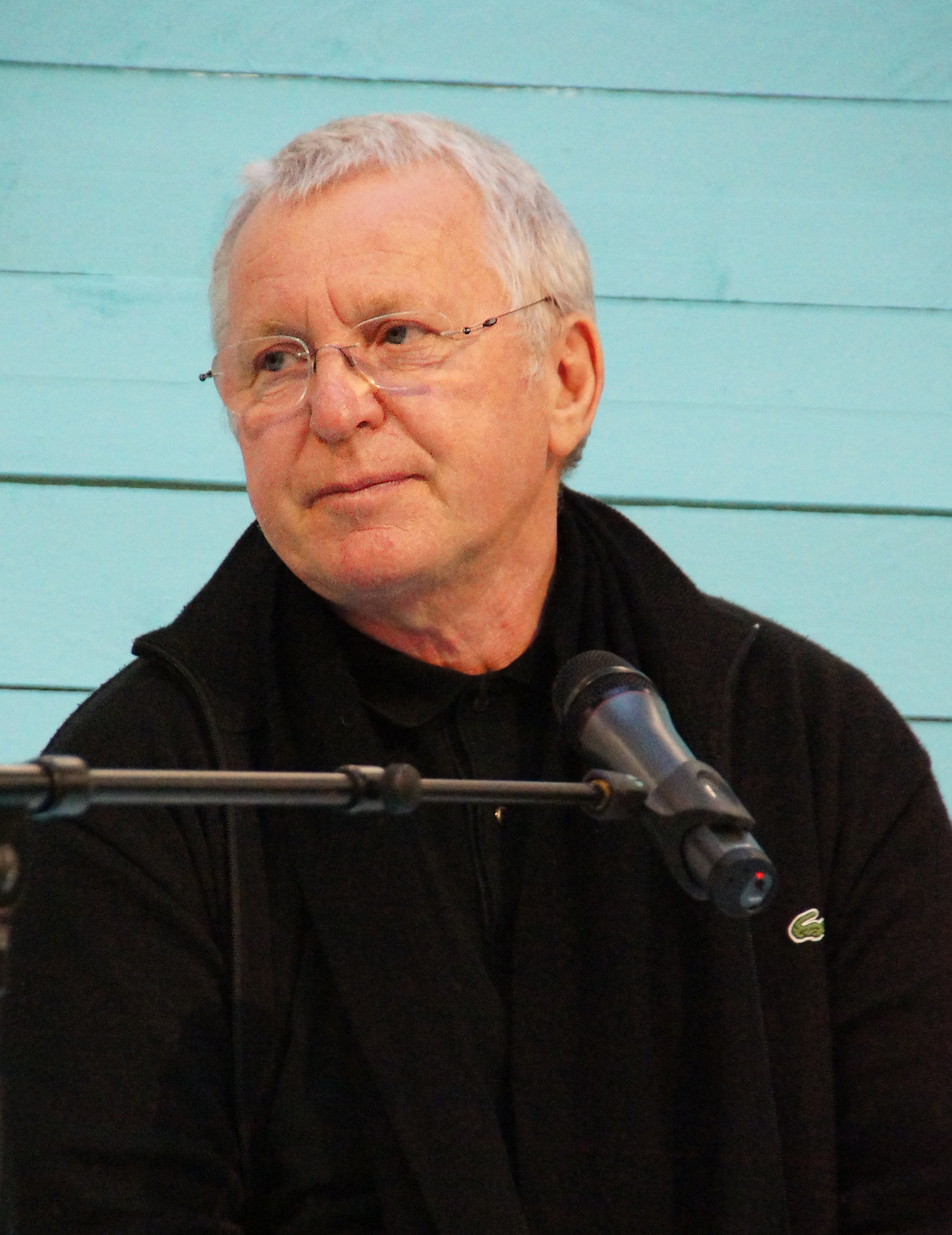 Unter dem Titel "Eine Versammlung kommt selten allein" lasen, anlässlich des 40. Jahrestages der Gründung, Lyriker und Lyrikerinnen der Grazer Autorinnen Autorenversammlung im "Salon für Kunstbuch im 21er Haus". Abgebildete Personen: S. Dateiname.